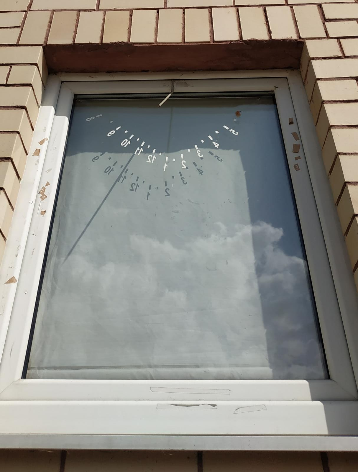 התמונה צולמה בעיר גרודנה, בלרוס Grodno, Belarus